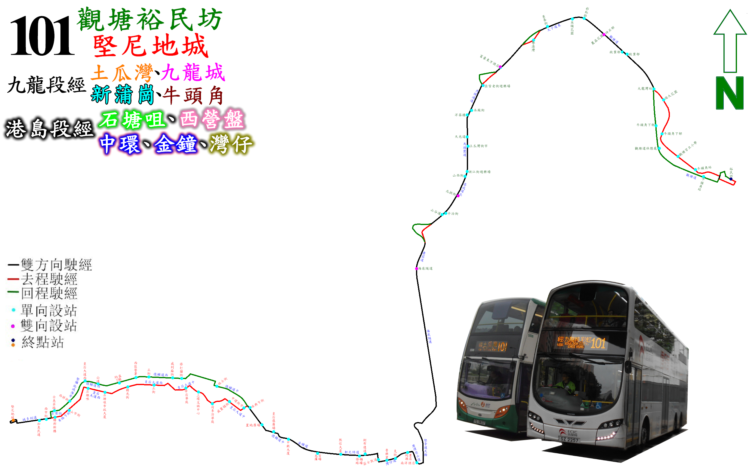 中文（香港）: 過海隧巴101線的走線圖